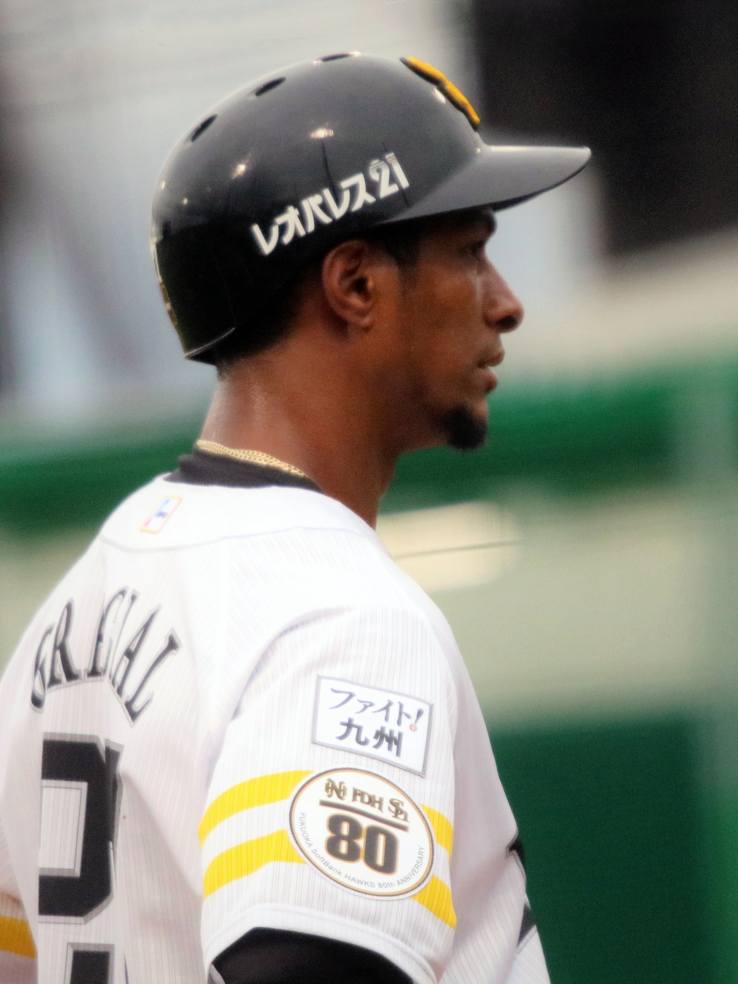 2018/4/6 タマホームスタジアム筑後 室内練習場